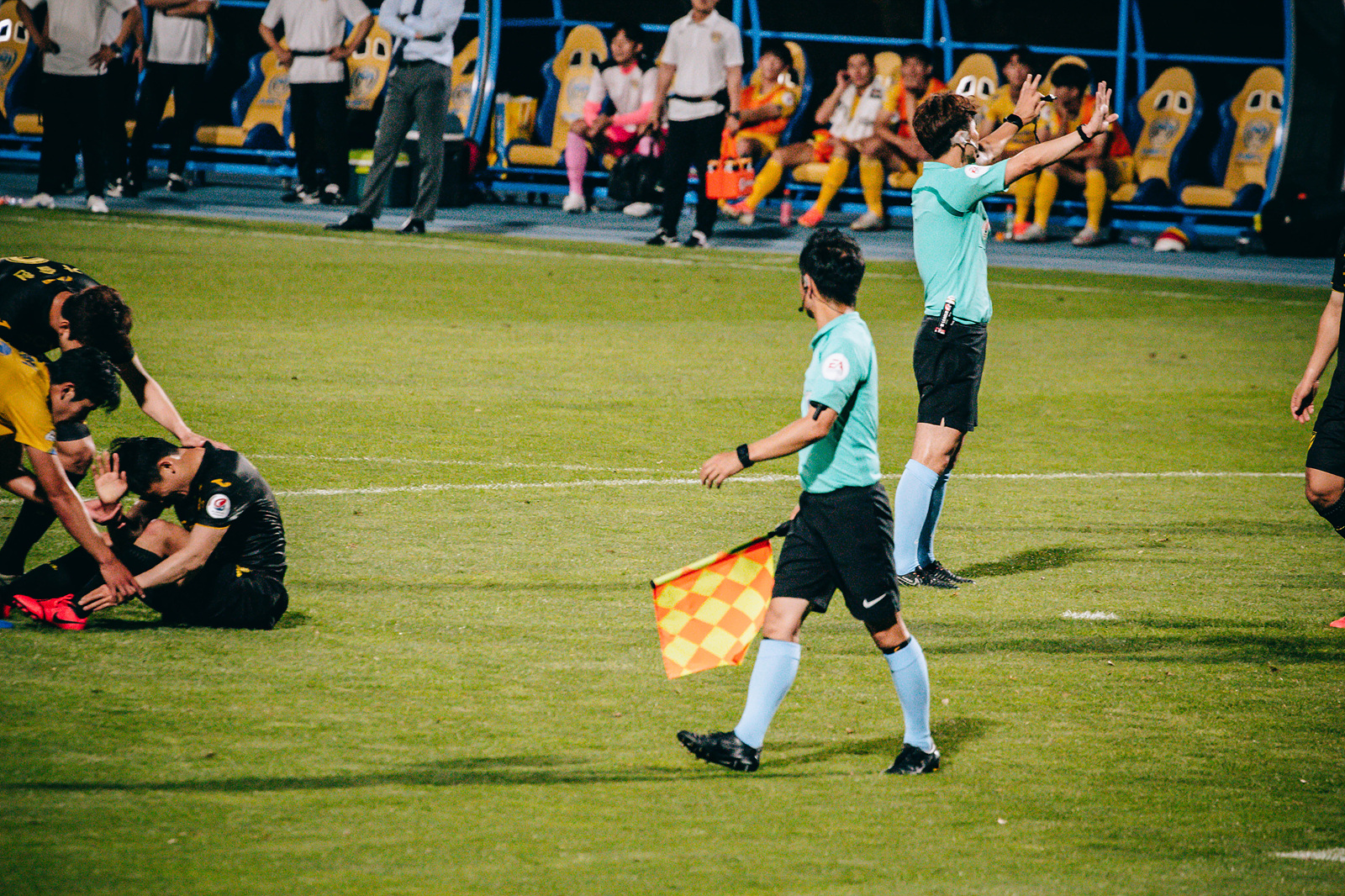 심판이 선수들의 반칙을 정리하고 있다.